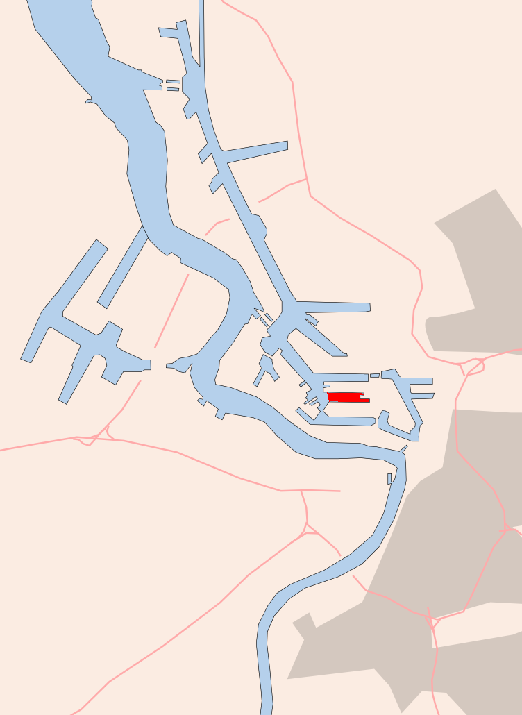 Antwerp , 4e havendok